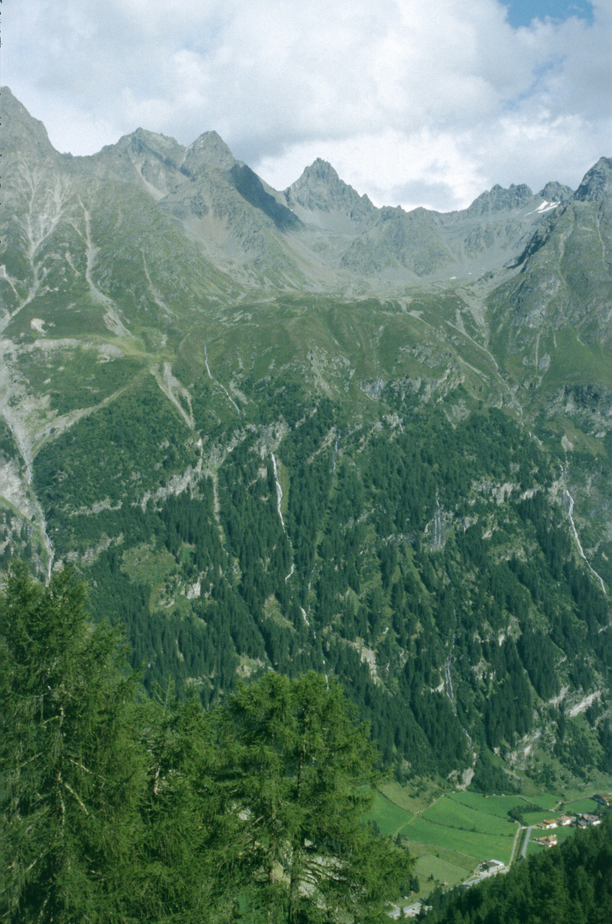 Luibiskogel von Westen, von der Arzler Alm. Aufgenommen am 18.08.2002